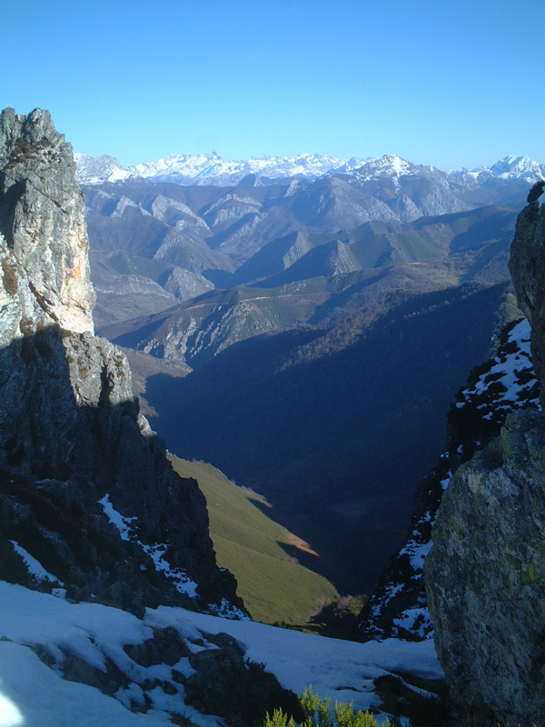 Parque natural de Redes, al fondo los Picos de Europa